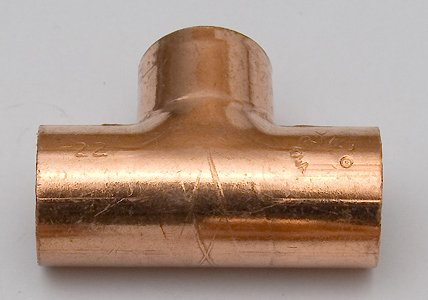 Kupferfitting Typ 5130: T-Stück